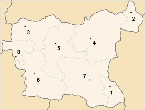 Sujet : carte des obchtini (municipalités) de l'oblast de Lovetch, en Bulgarie Auteurs : Потребител:Ljubo (Любомир Таушанов = Lyoubomir Taouchanov), pour la version originale en bulgare, Utilisateur:Hégésippe Cormier, pour l'adaptation française (repères chiffrés) Source : Картинка:Lovec Oblast map.PNG (20 mai 2005) Licence